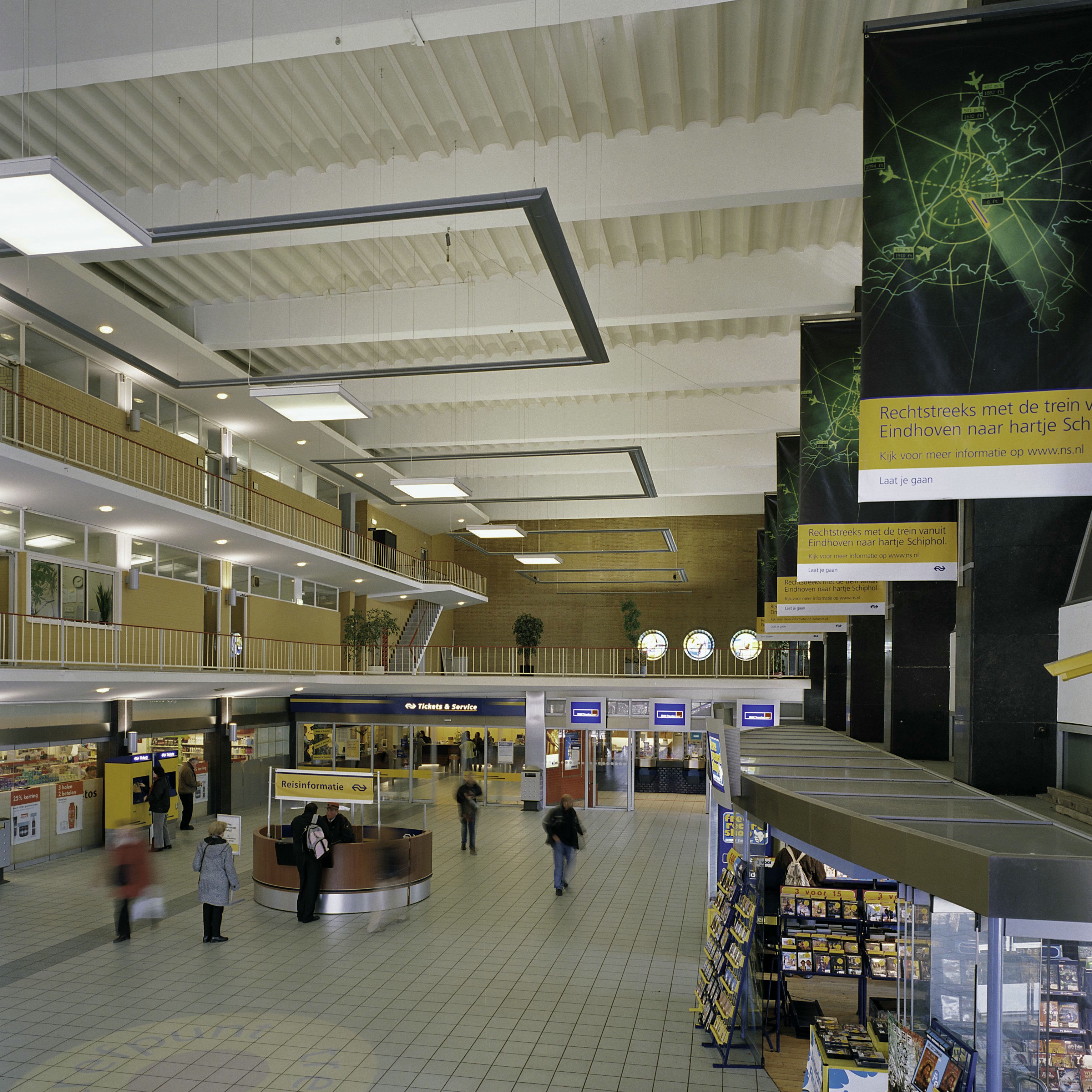 Spoorwegstation: Overzicht van de stationshal (opmerking: Gefotografeerd voor Monumenten van Herrezen Nederland)